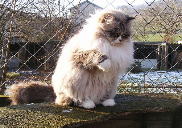 Baxa jeune chatte sibérienne néva-masquerade de couleur seal tabby point et blanc.